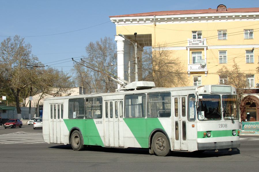 ZiU-9 2108 in Toshkent